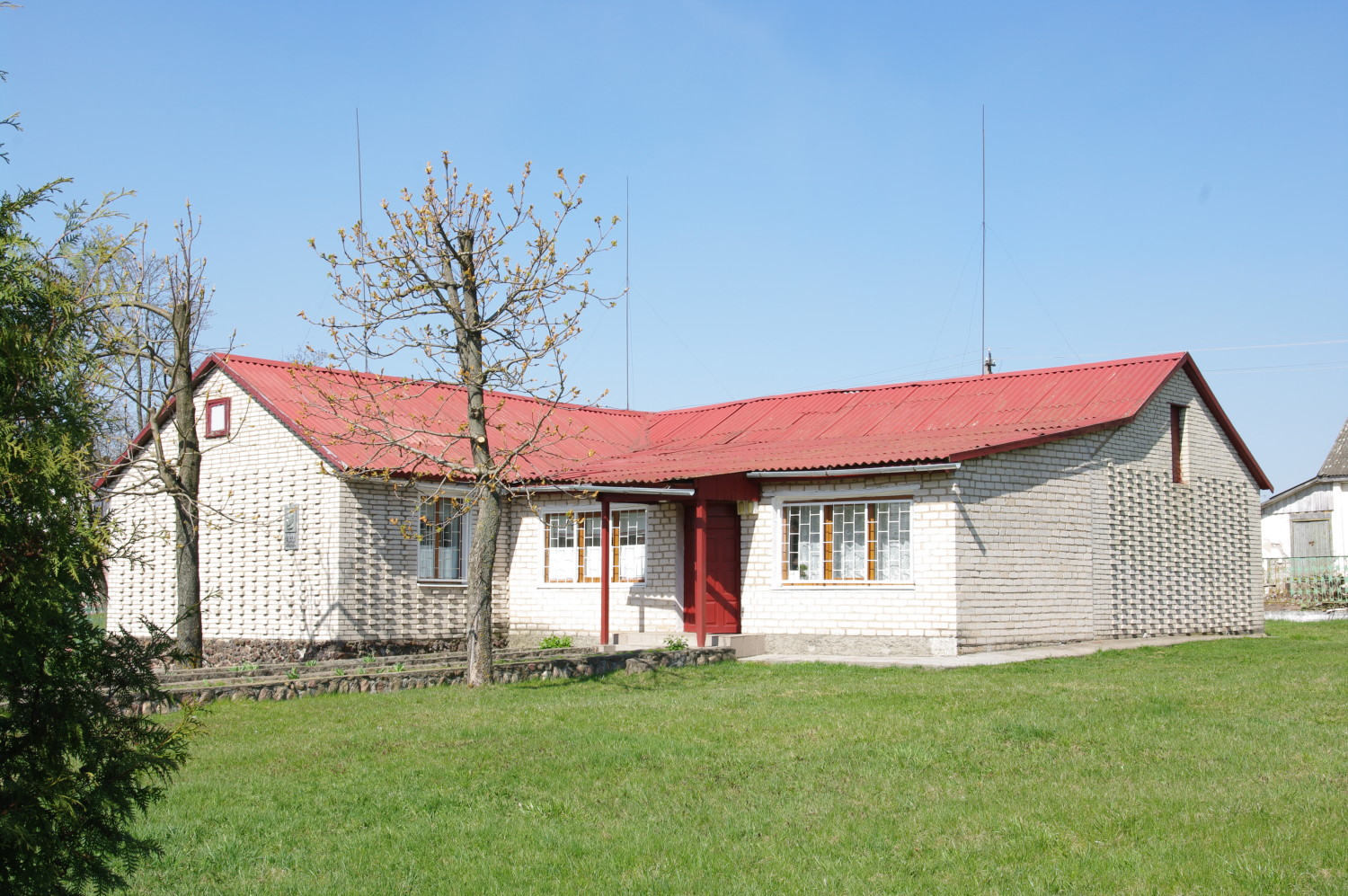 Літаратурны музей Кузьмы Чорнага ў Цімкавічах. Фота з сайта Дзяржаўнага музея гісторыі беларускай літаратуры